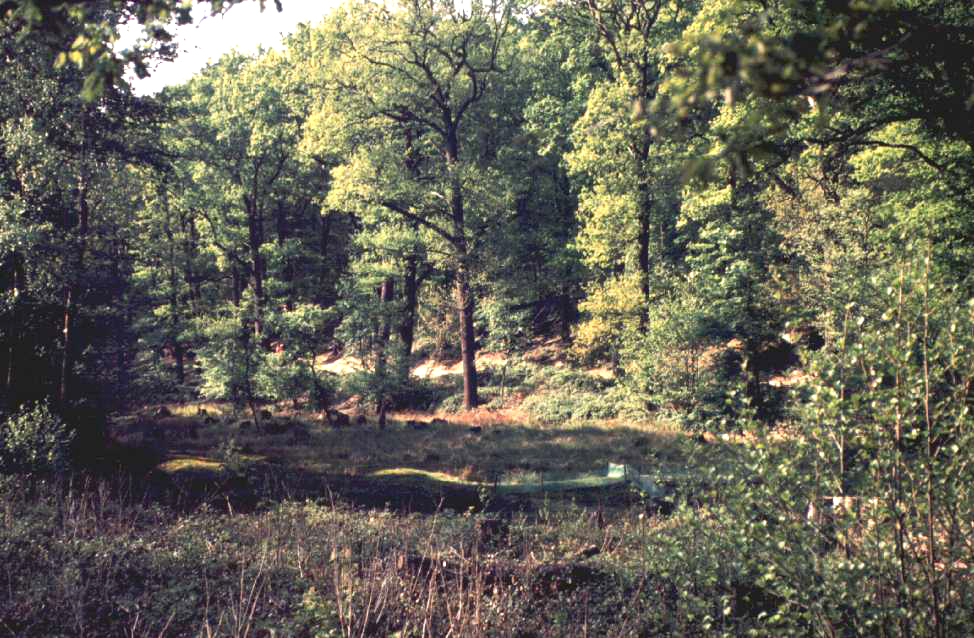 Naturschutzgraben an der Westseite des Hülser Berges mit Quelltümpel. Der Bereich hat aus botanischer und ökologischer Sicht große Bedeutung. – Lage evtl. im NSG Hülser Bruch?